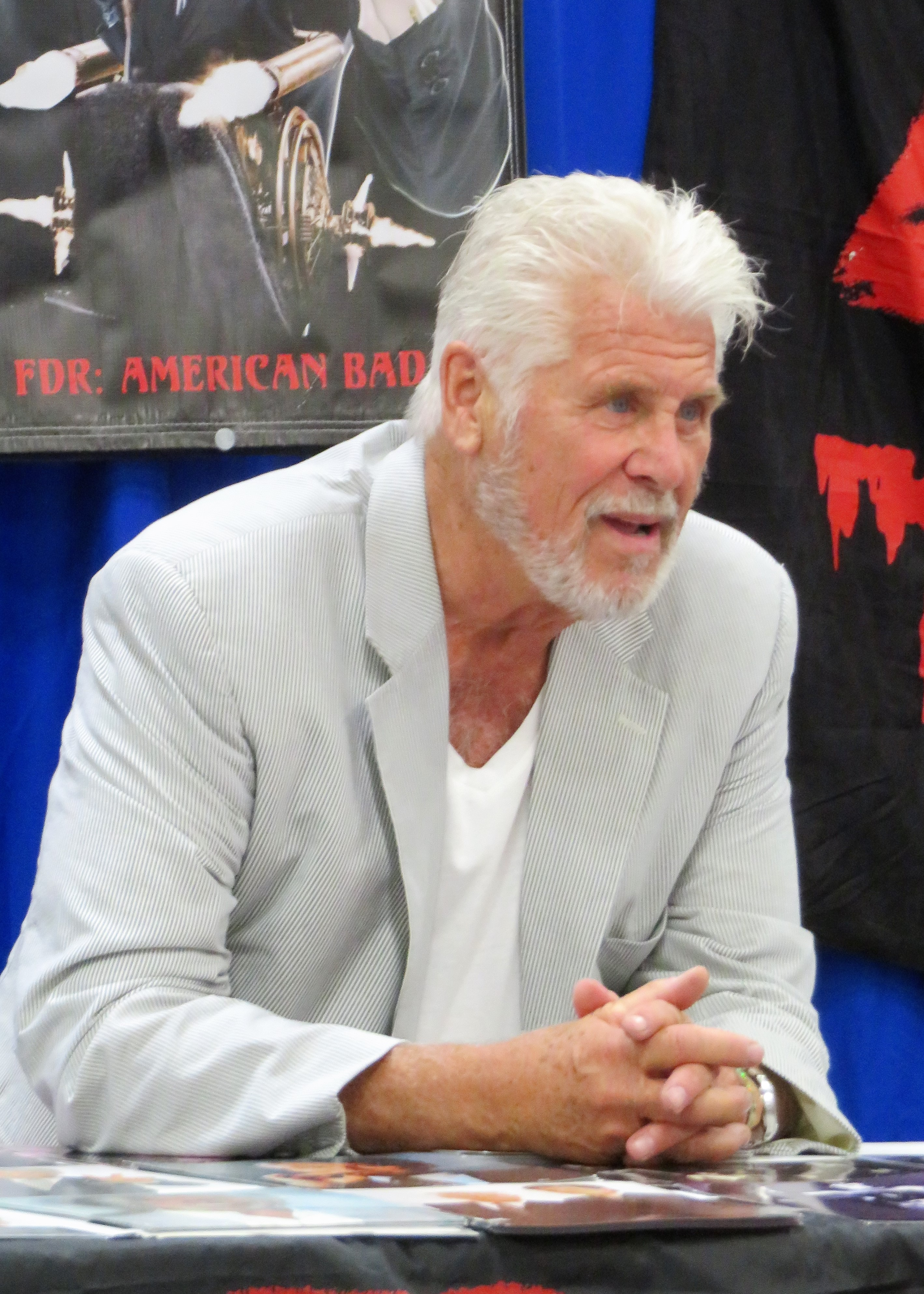 Barry Bostwick 02